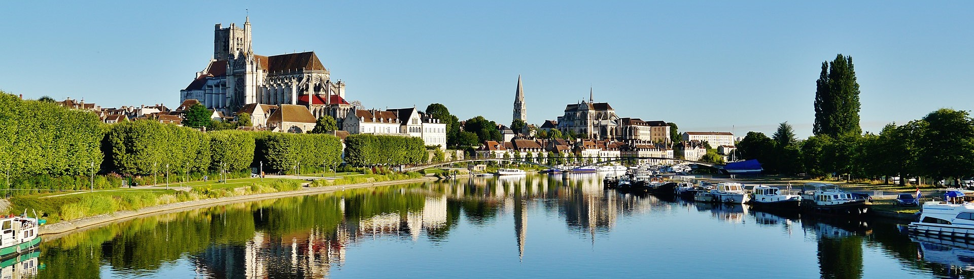 Auxerre Panorama Yonne